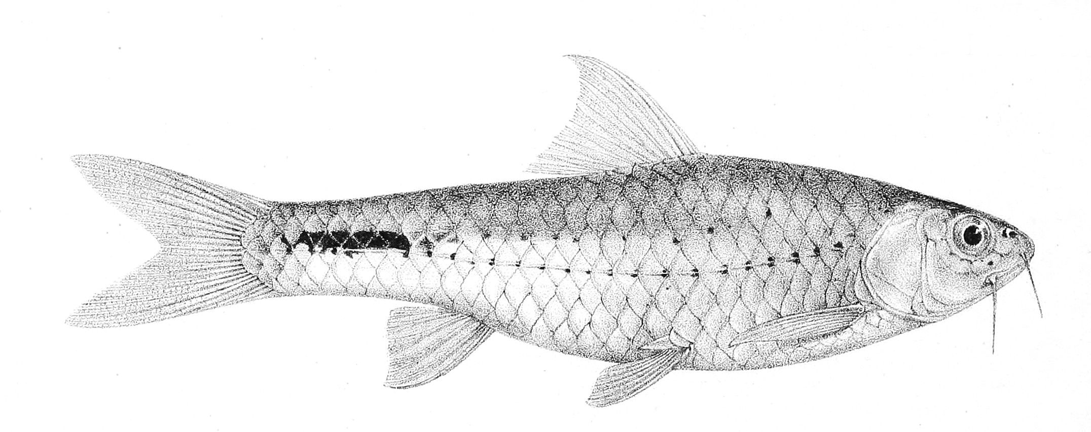 Barbus taeniurus